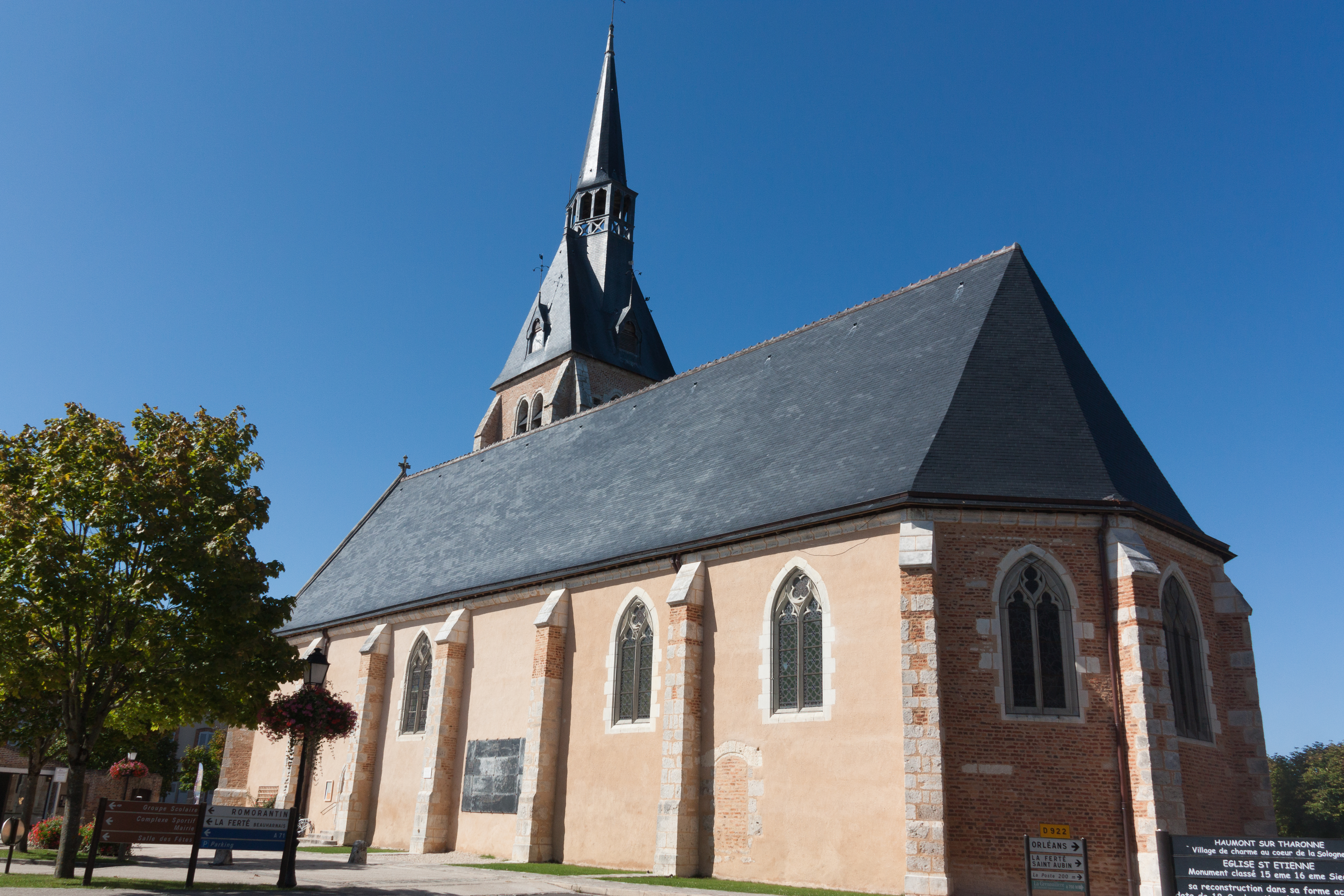 Église Saint-Étienne de Chaumont-sur-Tharonne - Chaumont-sur-Tharonne, Loir-et-Cher, France